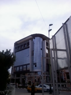 center bm